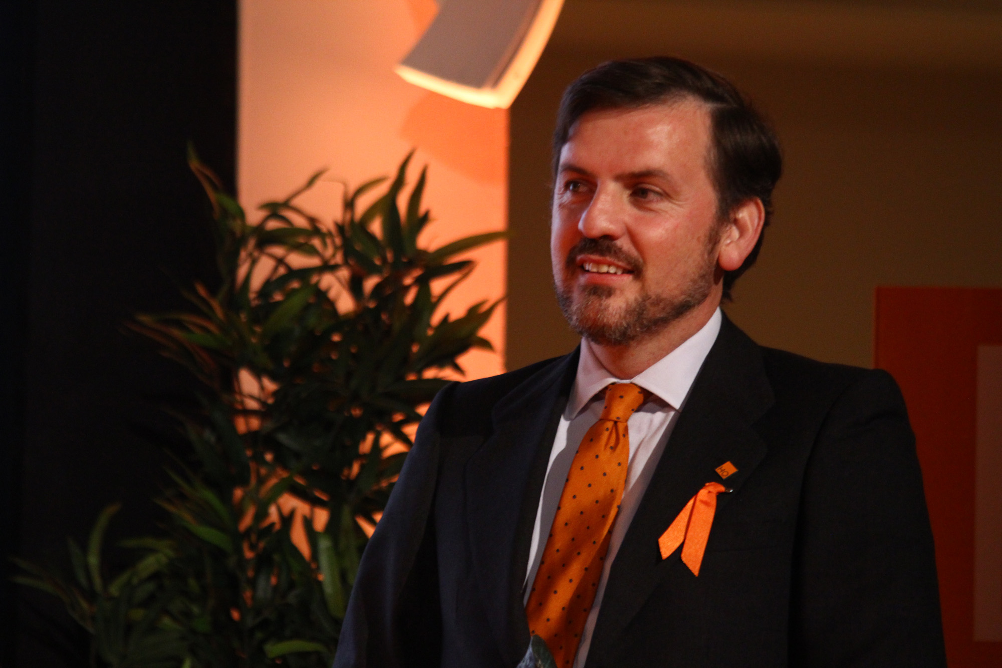 Ceremonia de entrega de los Premios 2014.